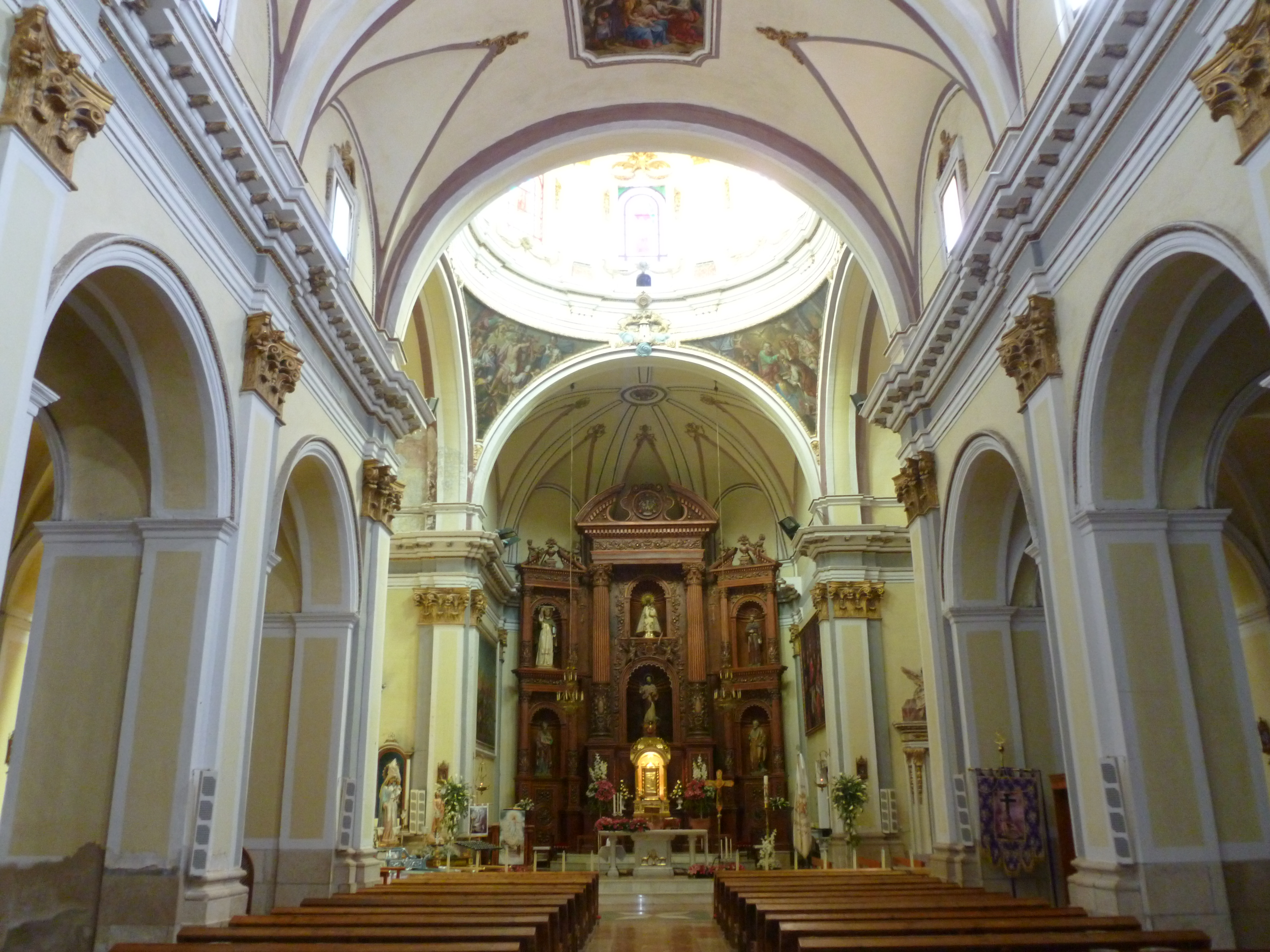 Església de Torreblanca 05.117-002.